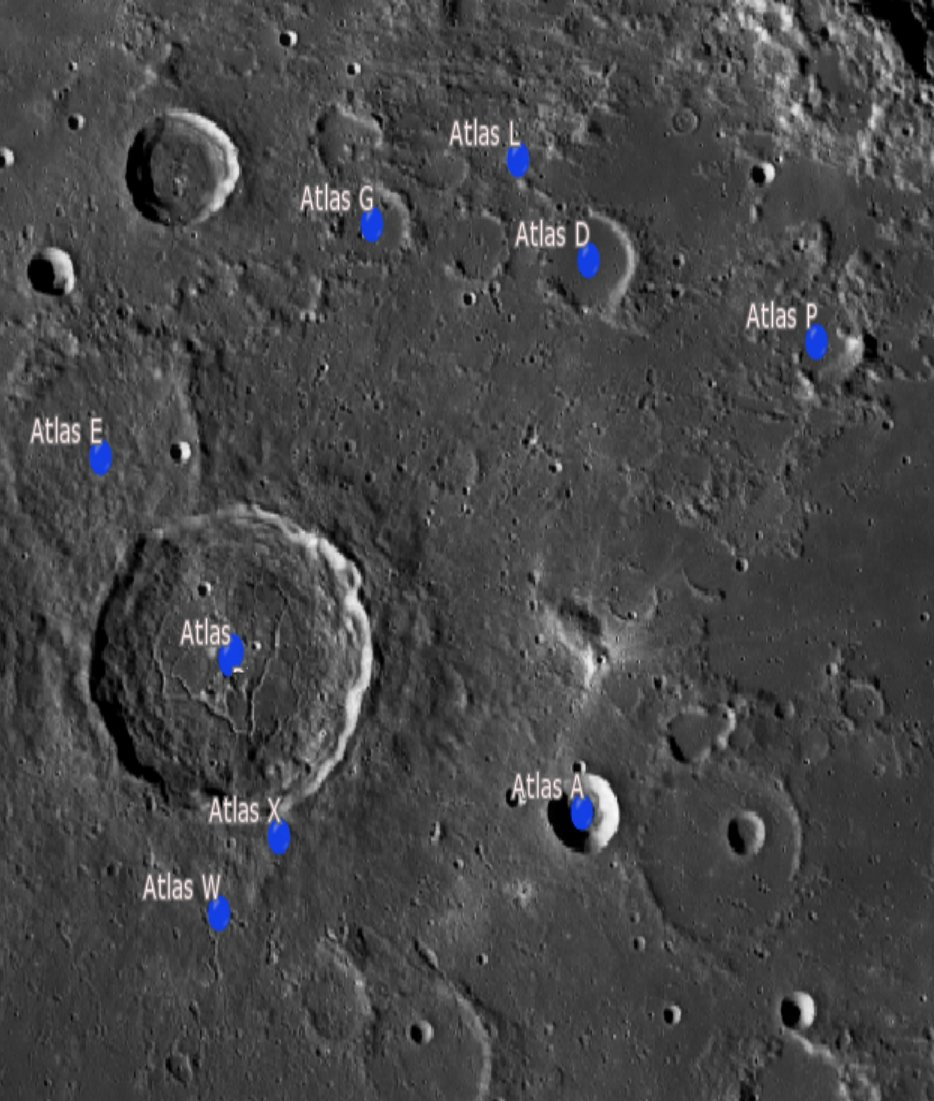 Cráter lunar Atlas. Cráteres satélite. (Imagen LRO)